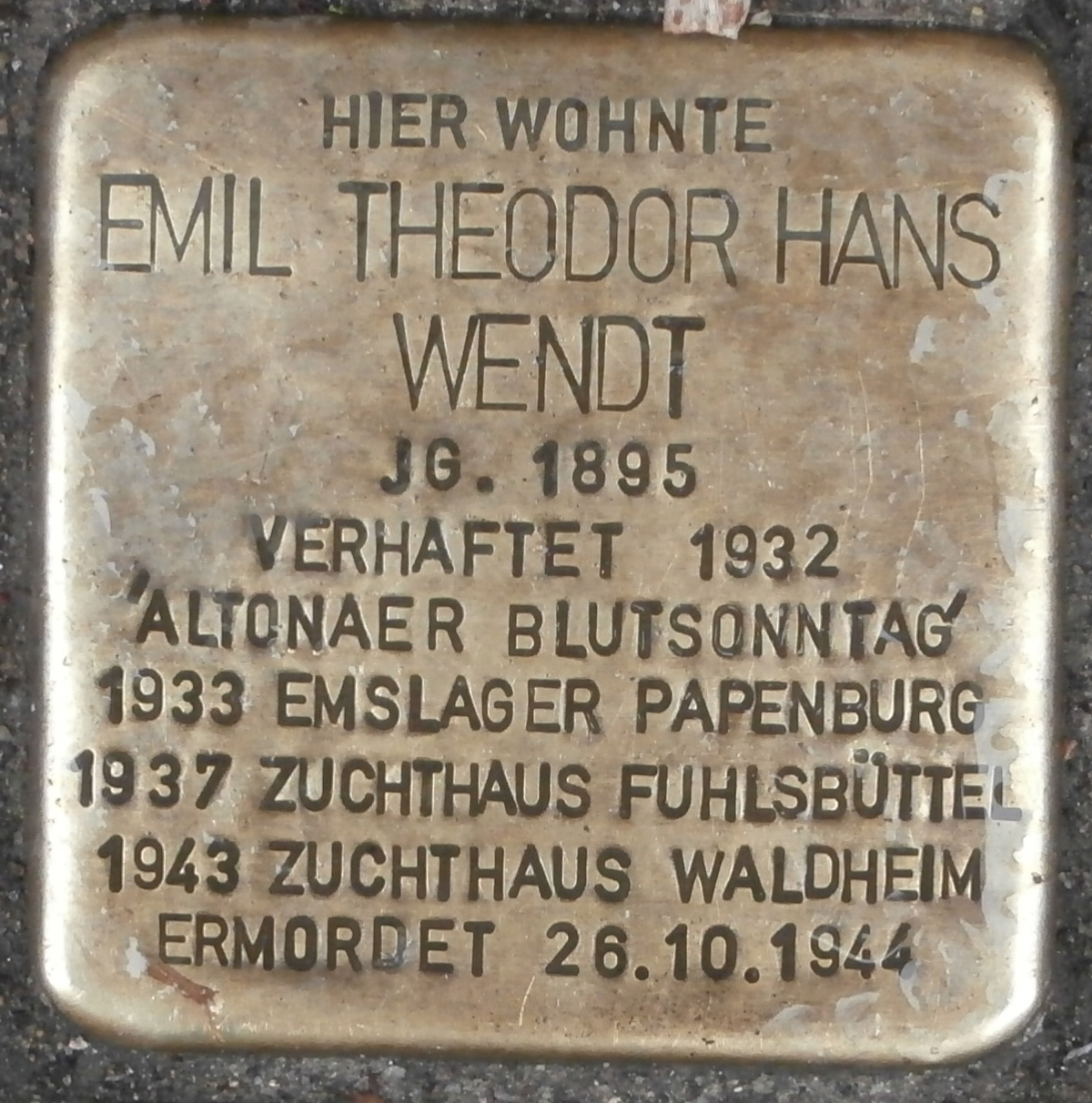 Stolperstein für Emil Theodor Hans Wendt